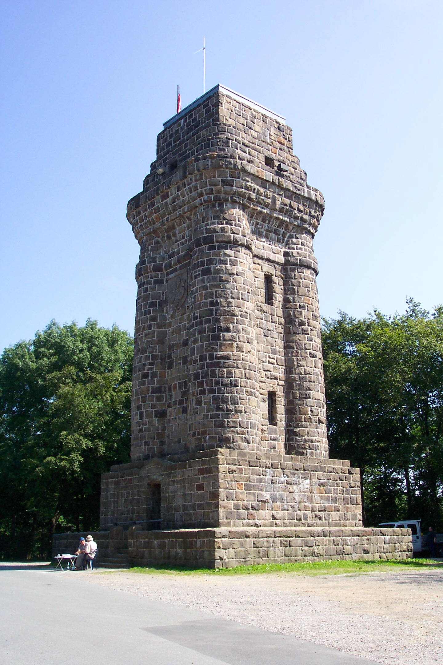 Bismarkturm auf der Hardt, Wuppertal